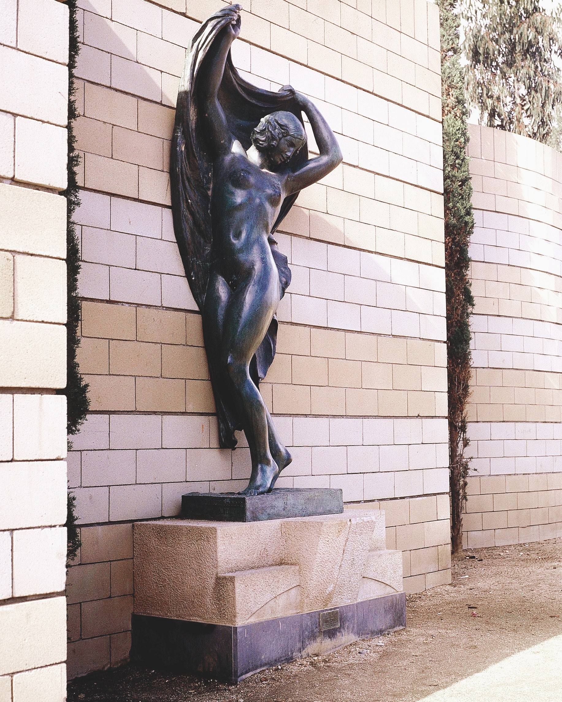 Jardins de Walter Benjamin, basamento e incorporación de la escultura de Antoni Alsina de 1929 bajo la influencia posmodena del proyecto de 1982